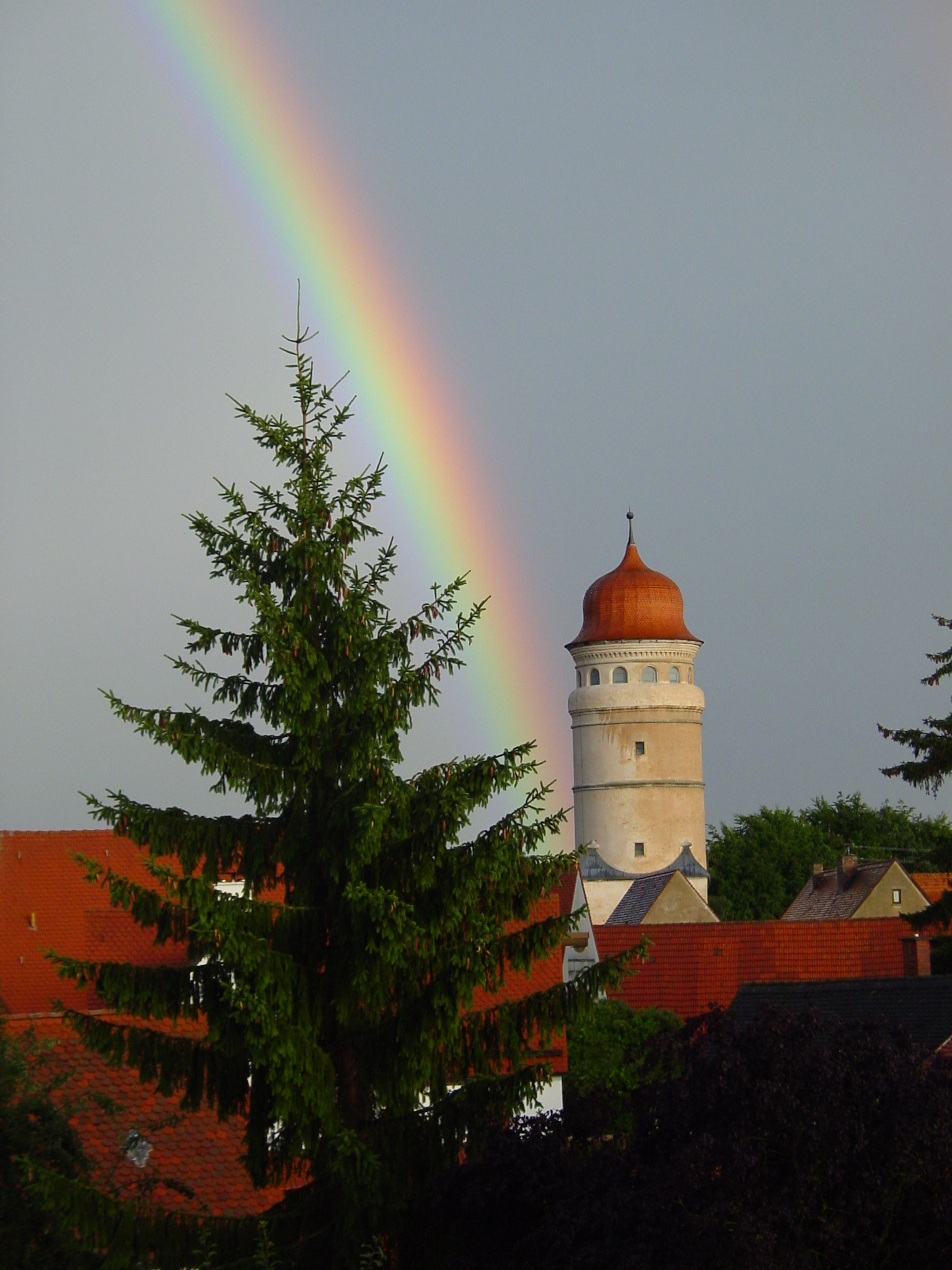 Vista de un arcoiris junto a la torre de Deininger en Nördlingen.